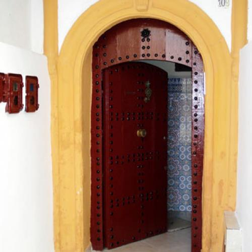 porte maison à salé